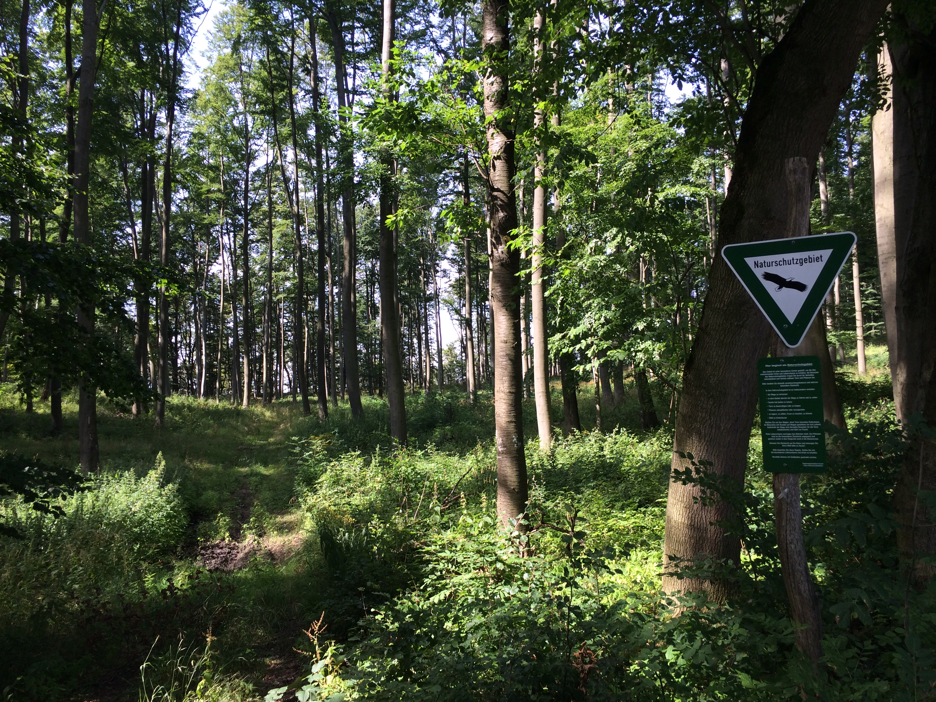 Der Werra-Burgen-Steig Hessen (X5H) zwischen Bundesautobahn 7 und Abzweig Atzenhausen (Rosdorf); (am Kreideberg)